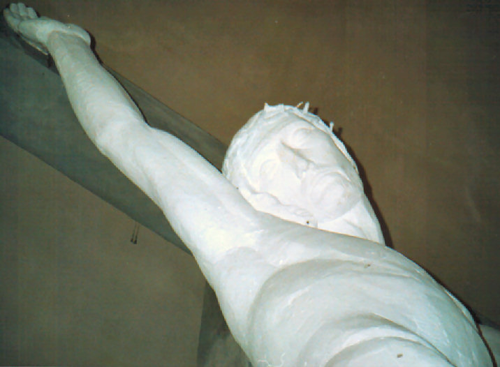 Détail de la sculpture sur béton du christ (placé près de l'autel). Photo par moi-même